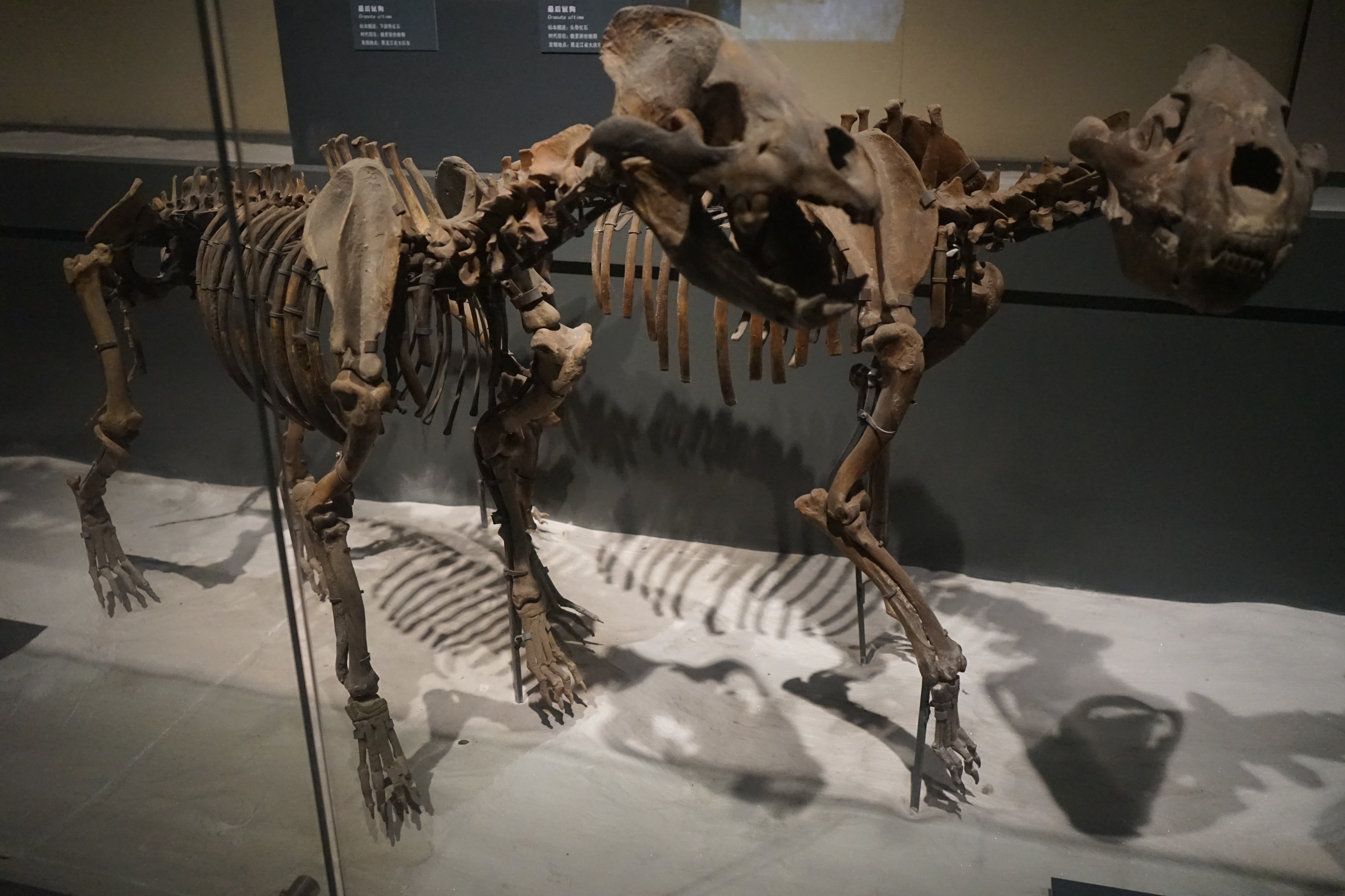 Crocuta ultima = Crocuta crocuta ultima 中文（中国大陆）: Crocuta ultima。完整骨架化石。晚更新世晚期。黑龙江省大庆市。